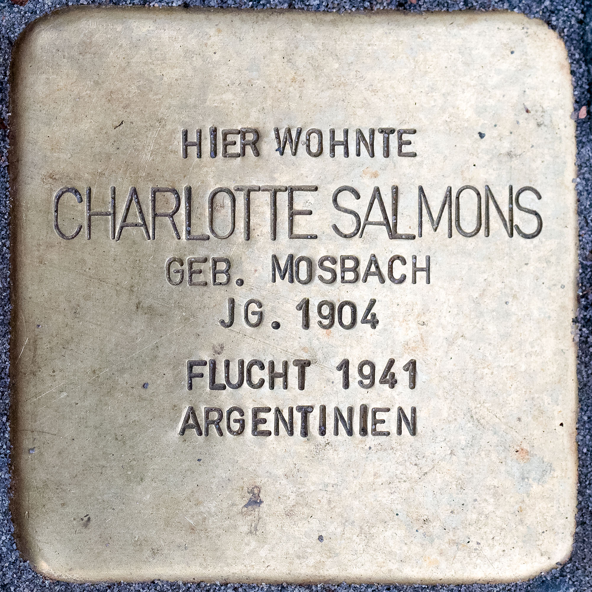 Stolpersteine Willich: Salmons, Charlotte